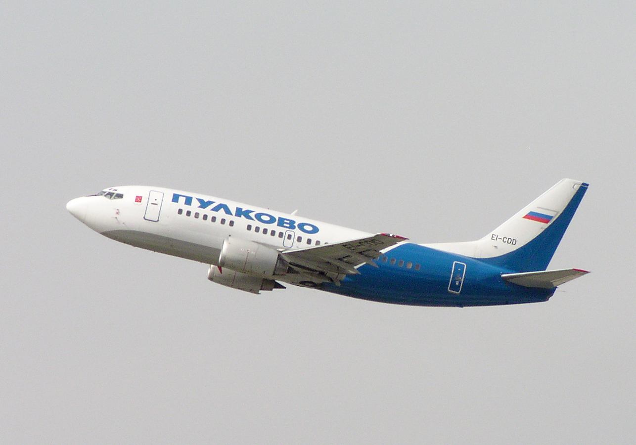 Pulkovo Boeing B737-500 EI-CDD in Düsseldorf (EDDL)